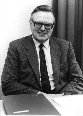 Foto di Klaus Habetha